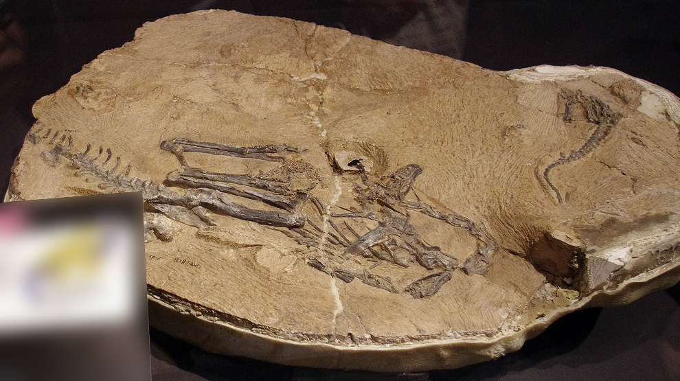 _IGP9948 国立科学博物館「恐竜博2011」。Limusaurus inextricabilis.